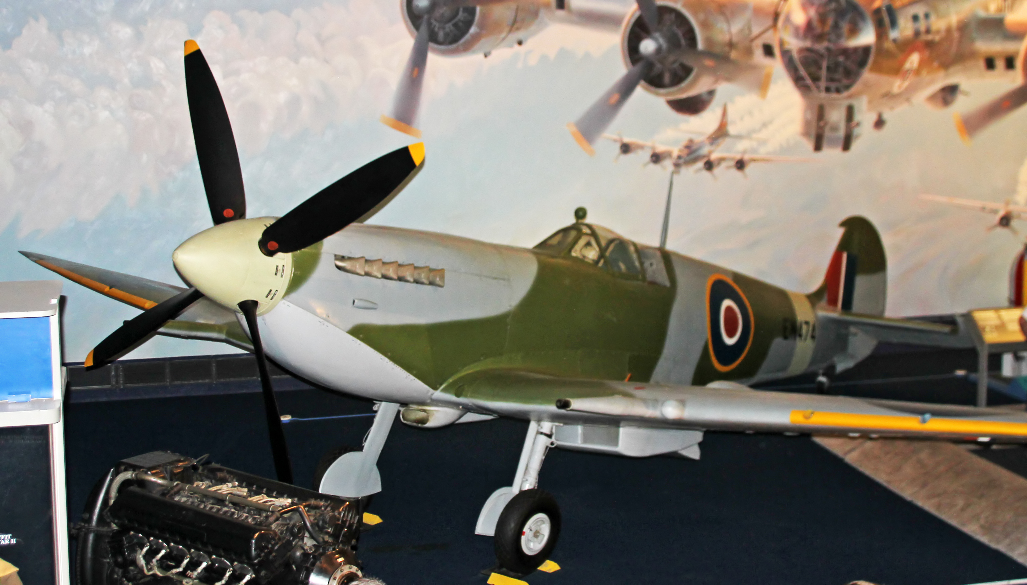 Supermarine Spitfire Mk VII